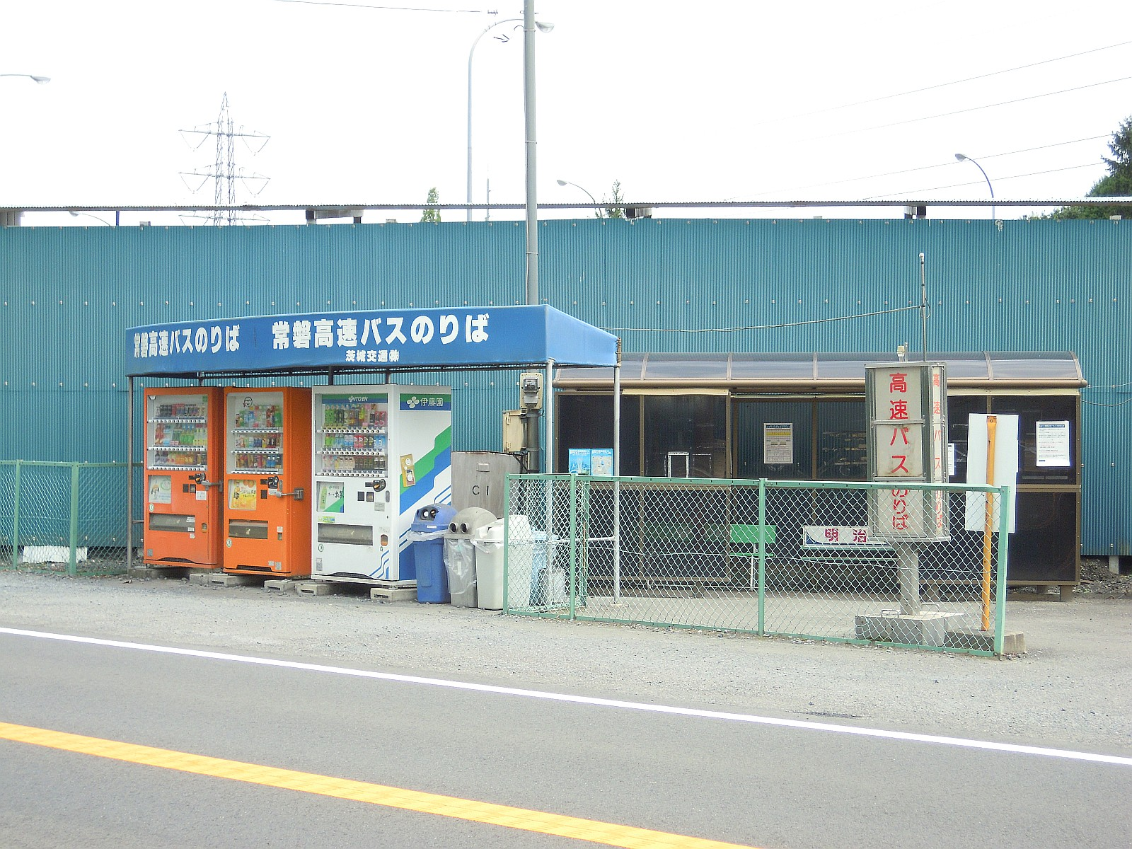 茨城県那珂市の常磐自動車道那珂インターチェンジの外側、茨城県道65号那珂インター線沿いにある那珂インターバス停。写真右側及び左奥に利用者向け駐車場がある。